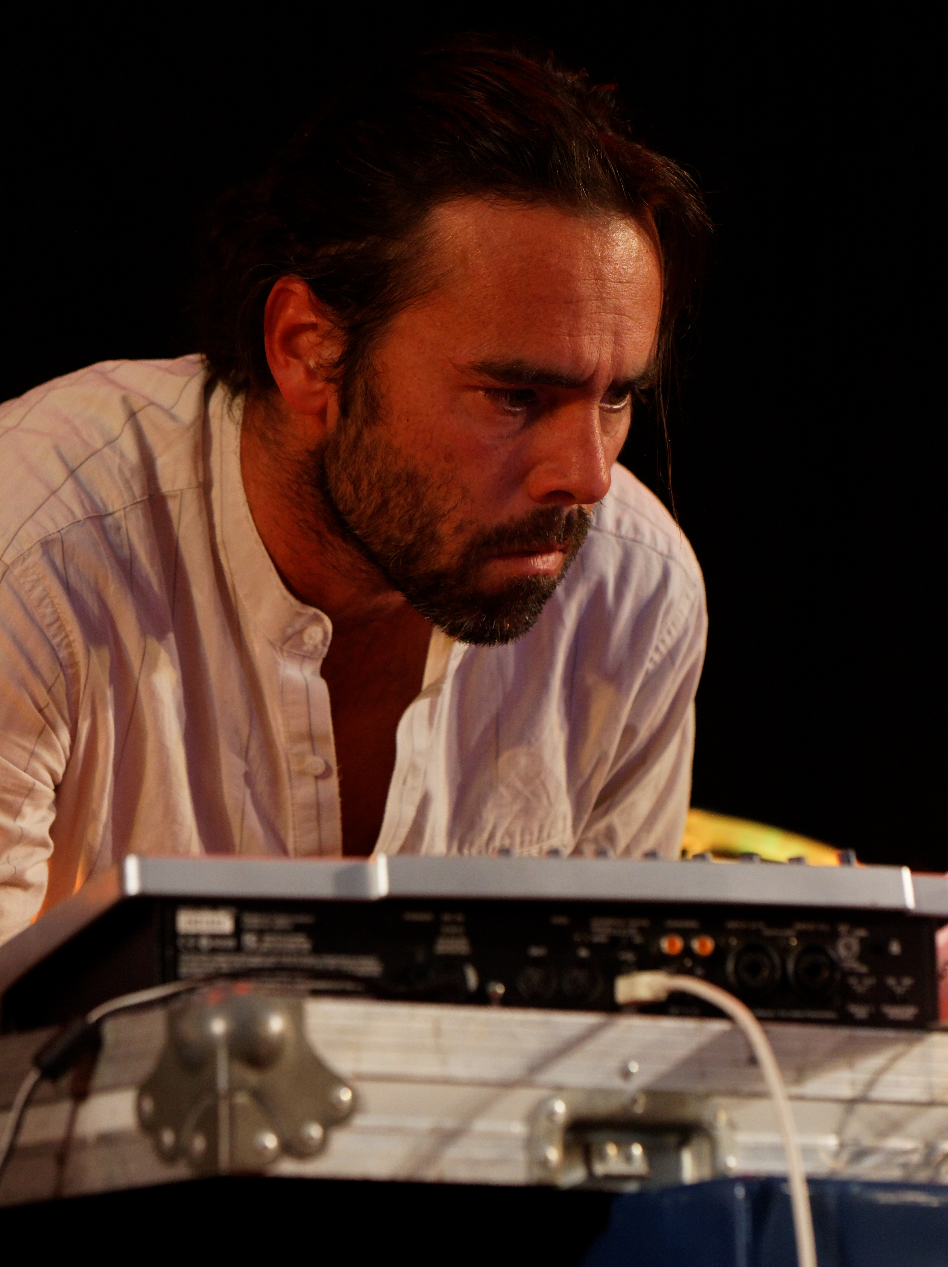 Hiks en concert le 19 juillet lors du festival de Cornouaille 2011.